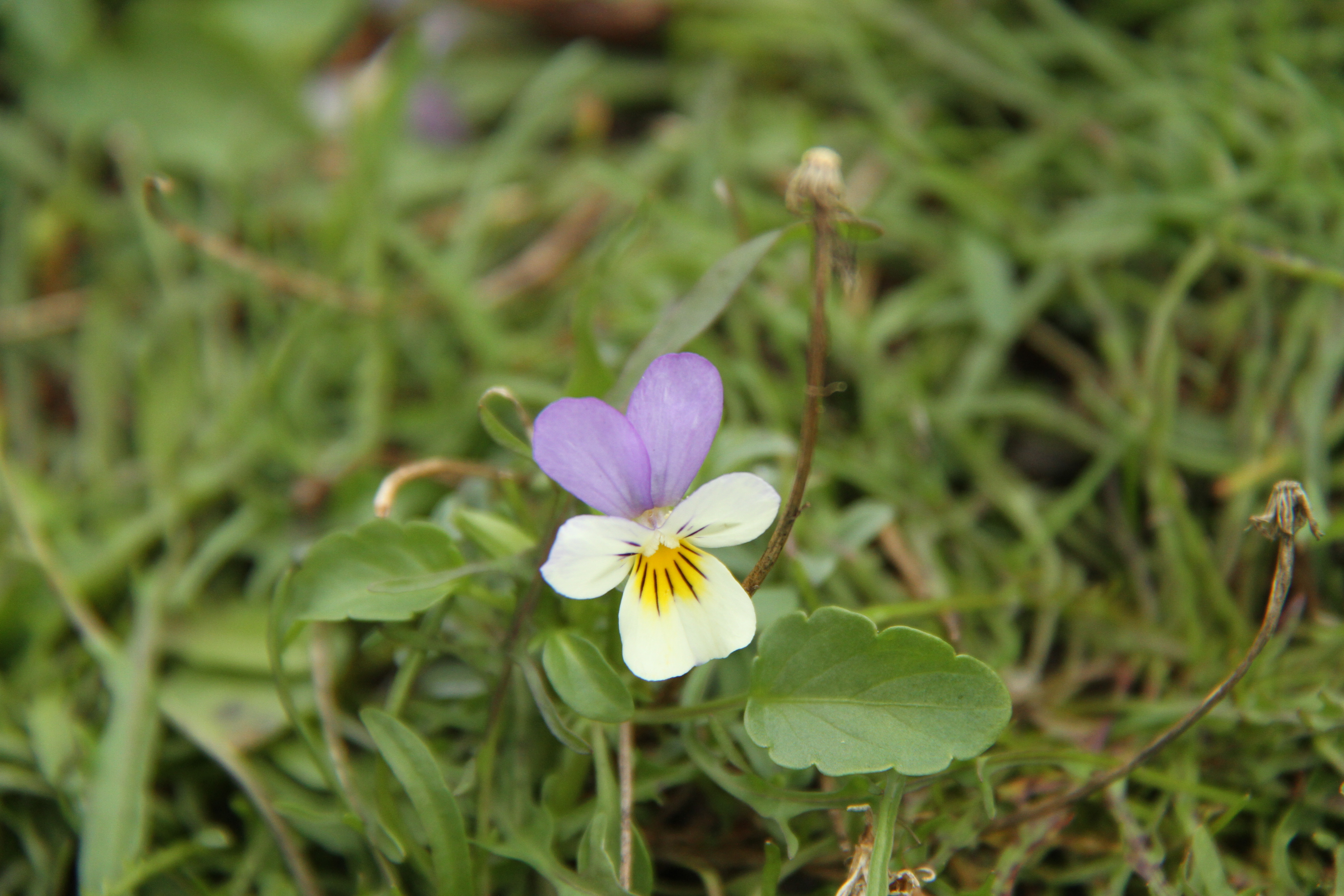 Nærbilde av Viola tricolor.